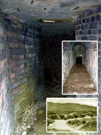 Arquitectura militar de la guerra civil española. Conjunto fortificado de Las Matas. Oviedo, Asturias